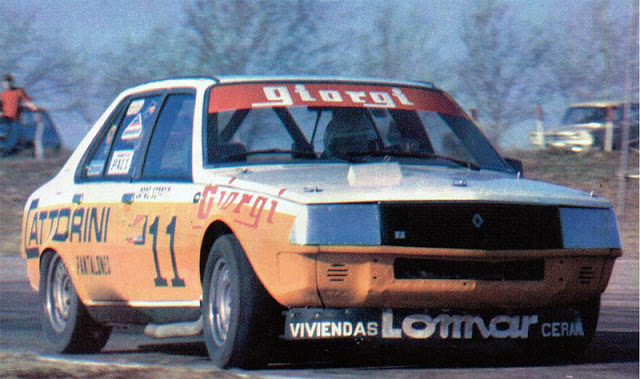 Jorge Serafini sobre su Renault 18, corriendo en TC 2000. Entre 1982 y 1984.